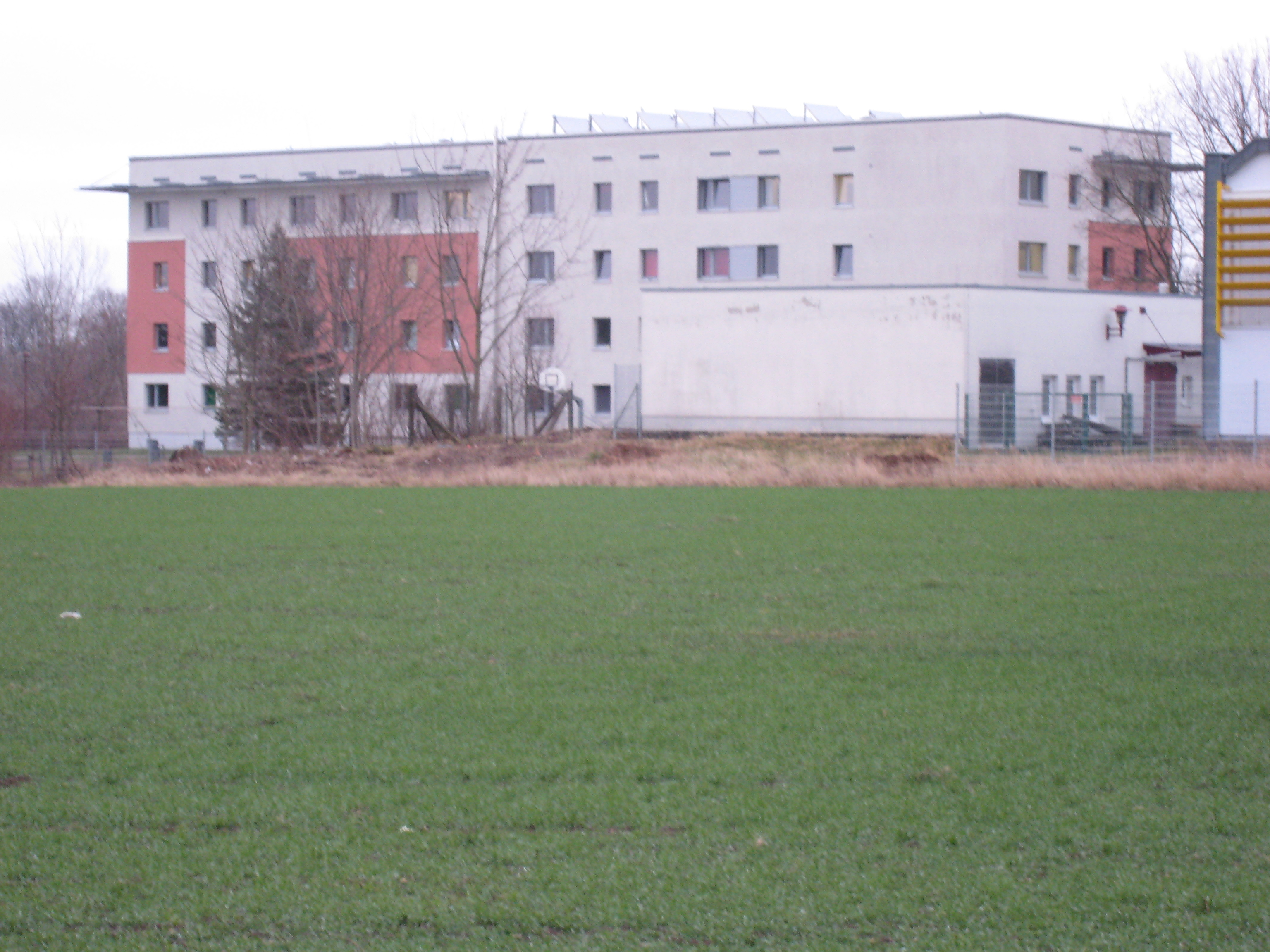 Junulargastejo de CJD en Arnstadt, Karl-Liebknecht-Straße 27a